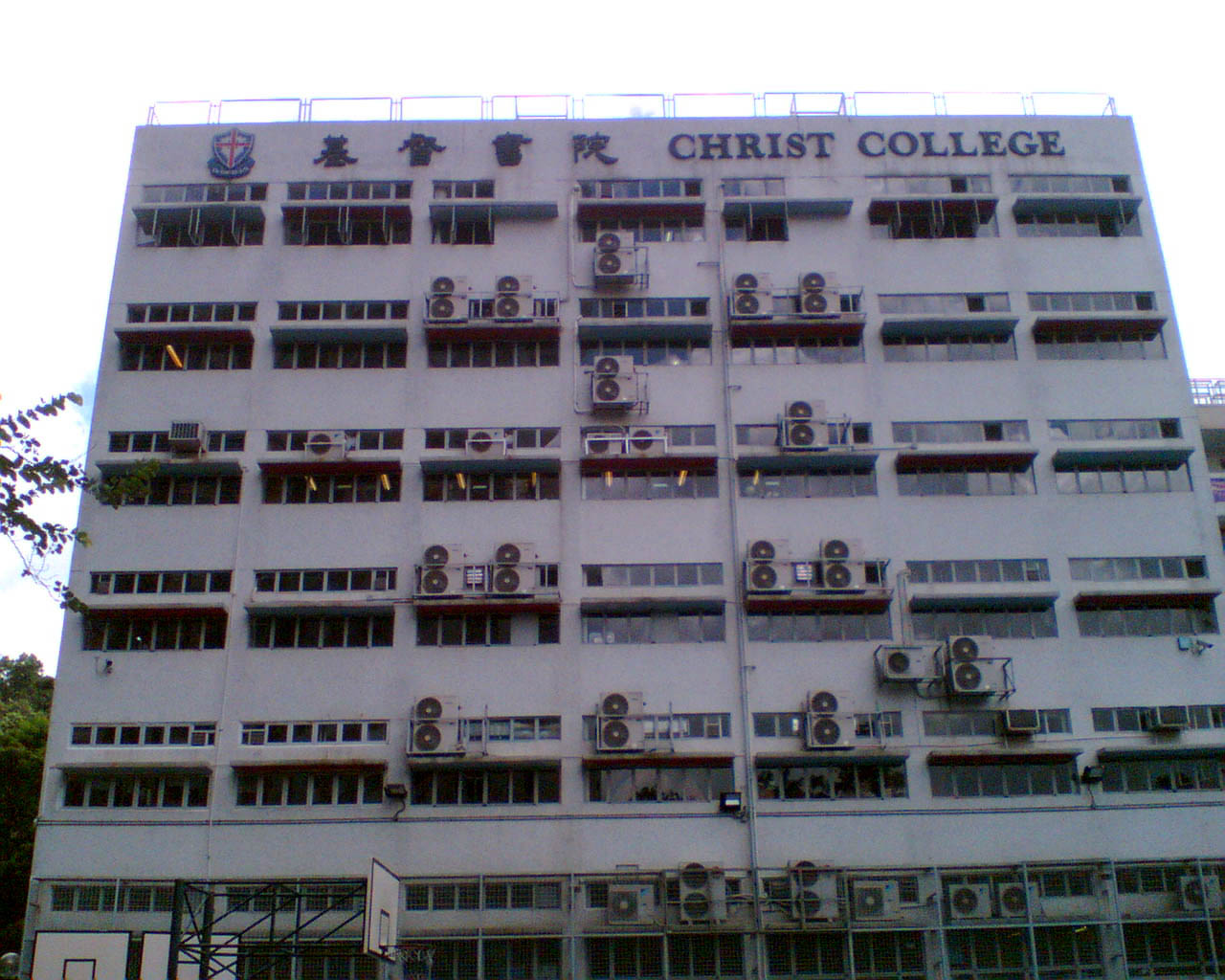 基督書院